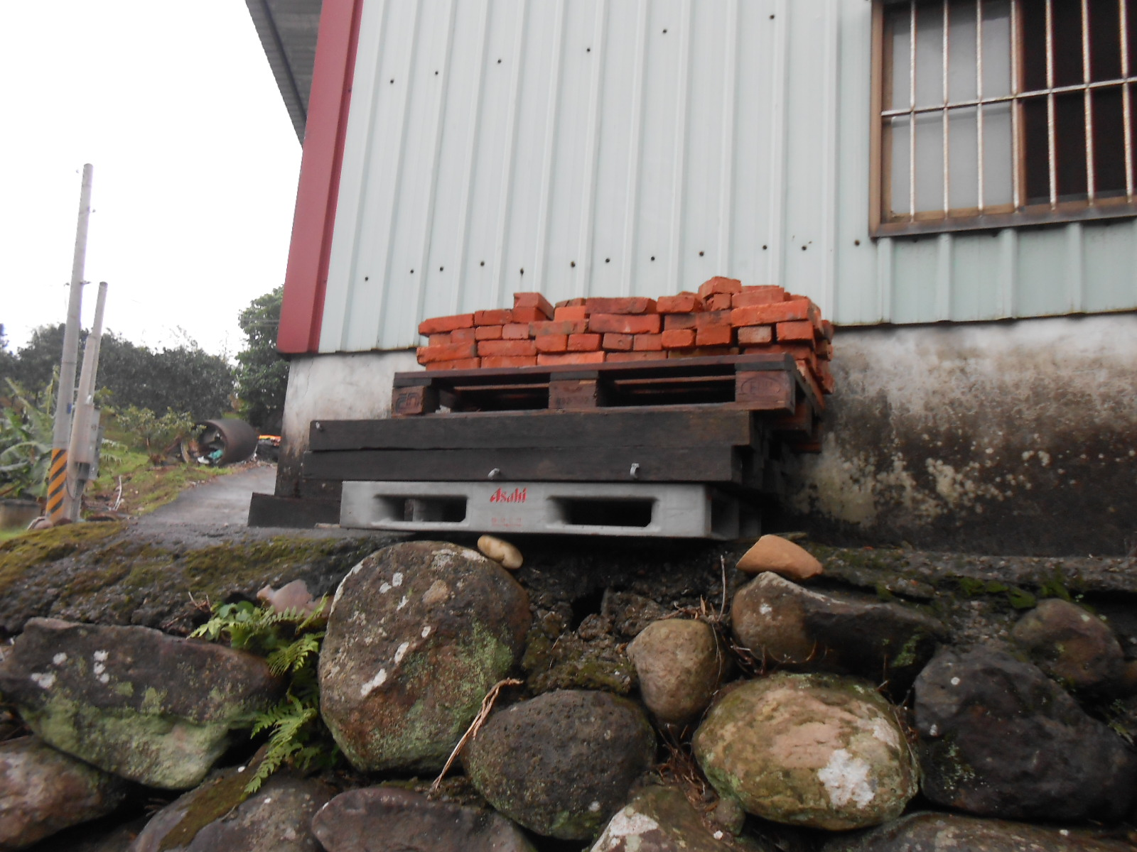 放置在工廠廠房外的紅磚。